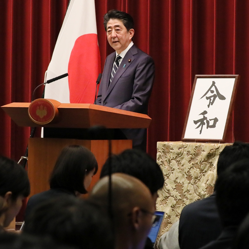 記者会見で新元号について説明する安倍晋三総理。